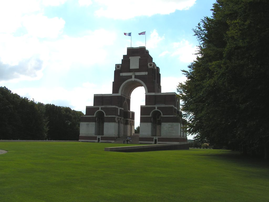 Mémorial Franco-britannique de la Première Guerre mondiale à Thiepval